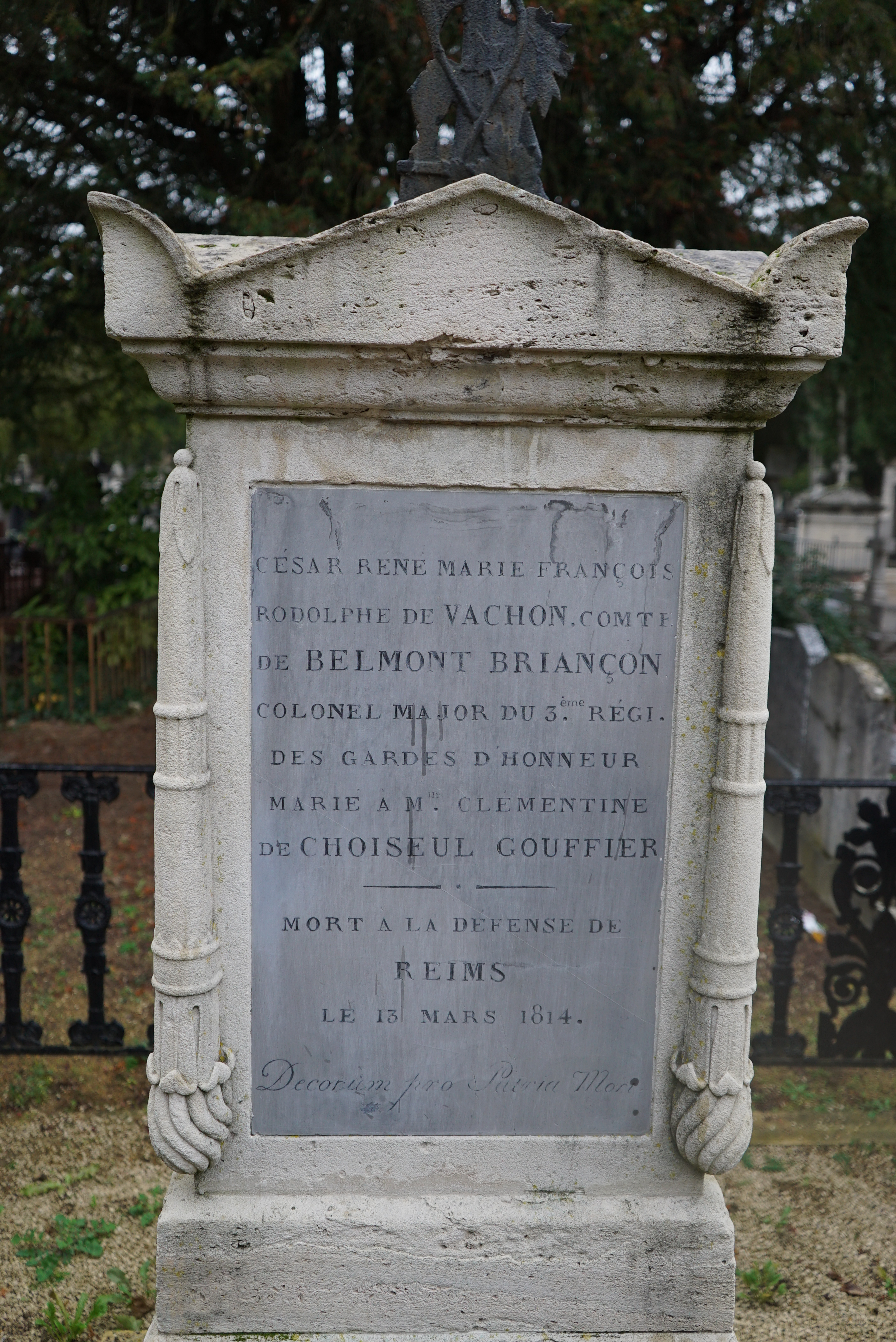 vue du mémorial à la bataille de Reims de 1814 au cimetière du nord.